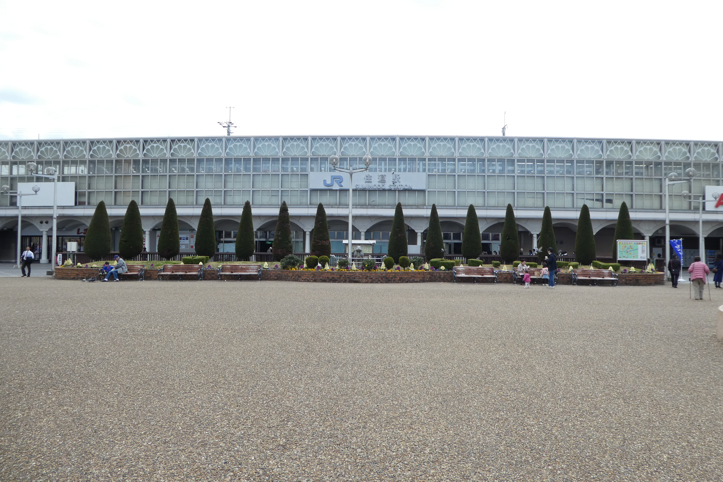 片町線（学研都市線）住道駅